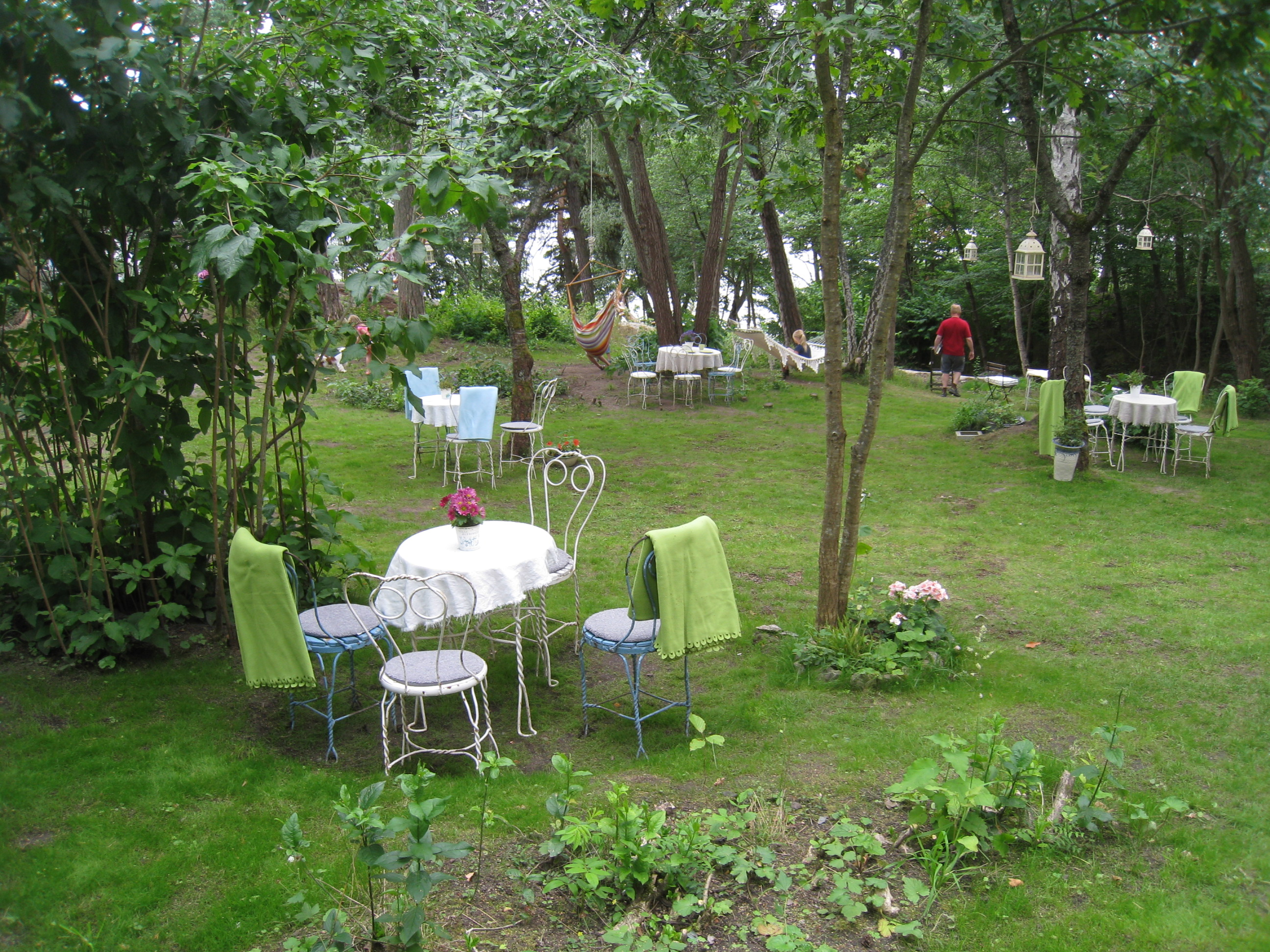 "Villa Skogsbo" i Ålstensskogen inom Smedslättens område, Bromma, byggd 1911. Drygt hundra år senare, sommaren 2012, var det Trädgårdscafé med självservering på tomten, öppet vid vackert väder.